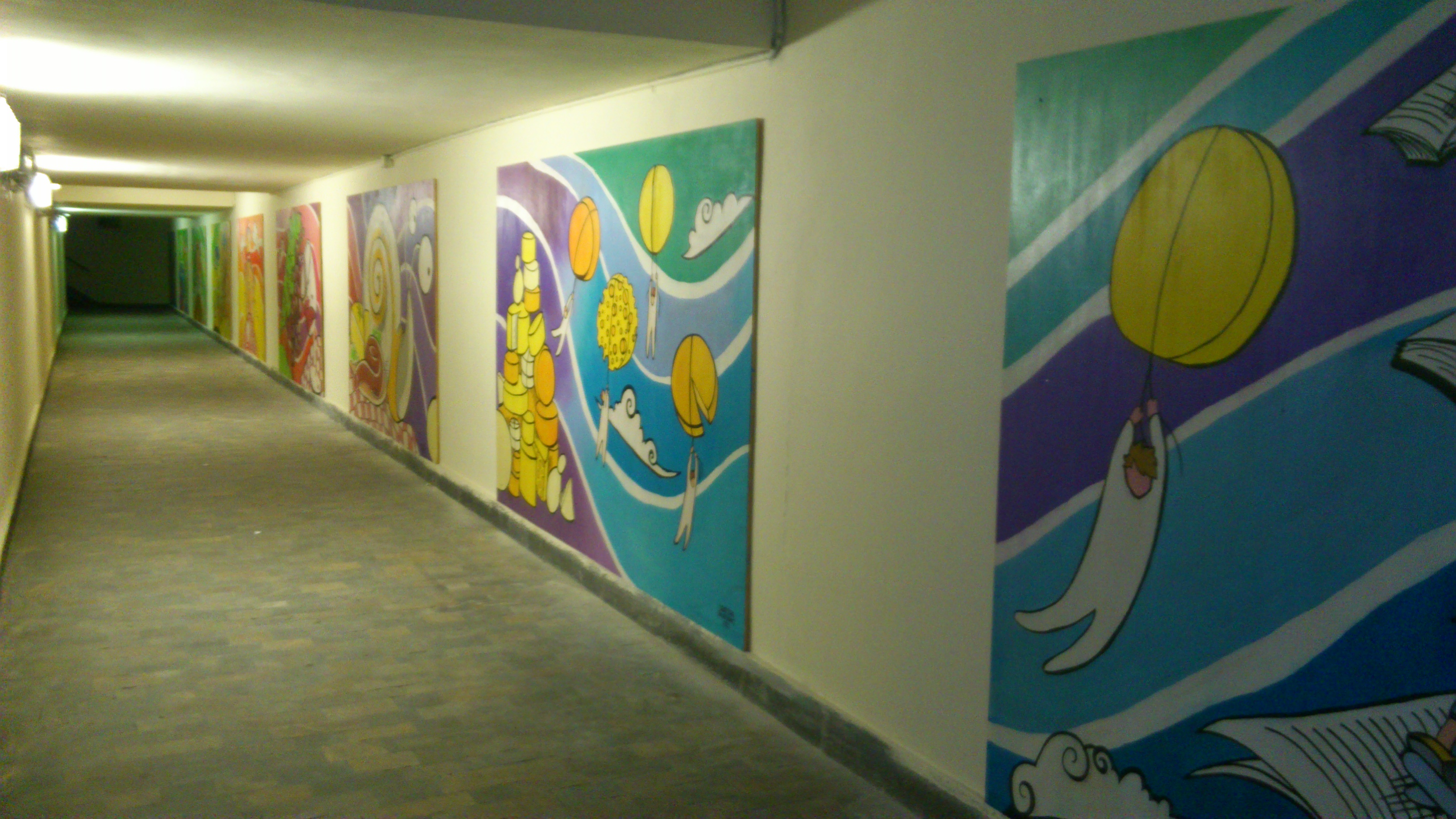 Il sottopassaggio pedonale nei pressi della stazione di Bra è stato recentemente riqualificato grazie all'impegno dei giovani dell'Oratorio Salesiano con un murales che stilizza le caratteristiche della città.